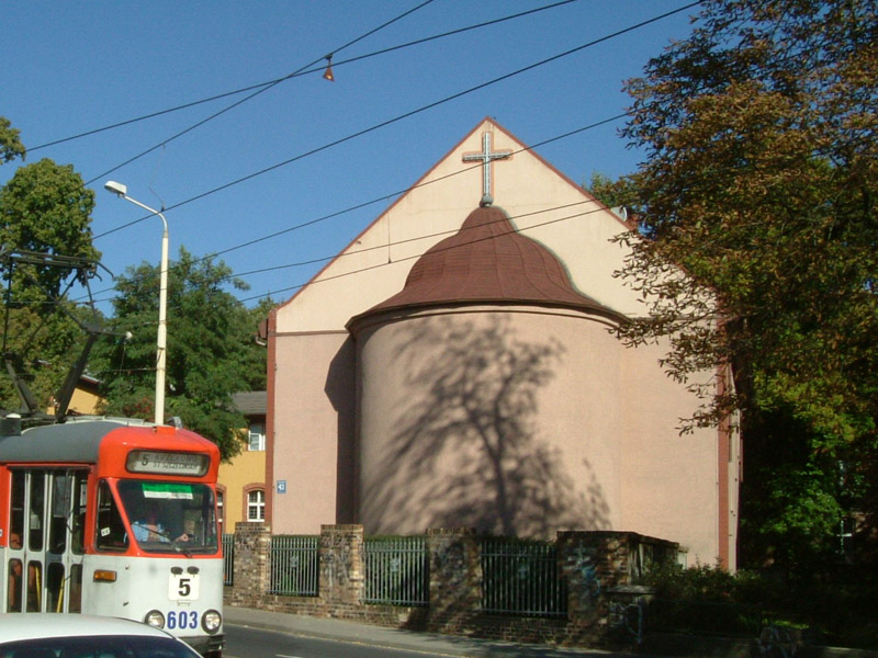 Ukrainische Griechisch-Katholische Kirche in der Mickiewicz-Straße in Stettin mit Straßenbahn, 2006